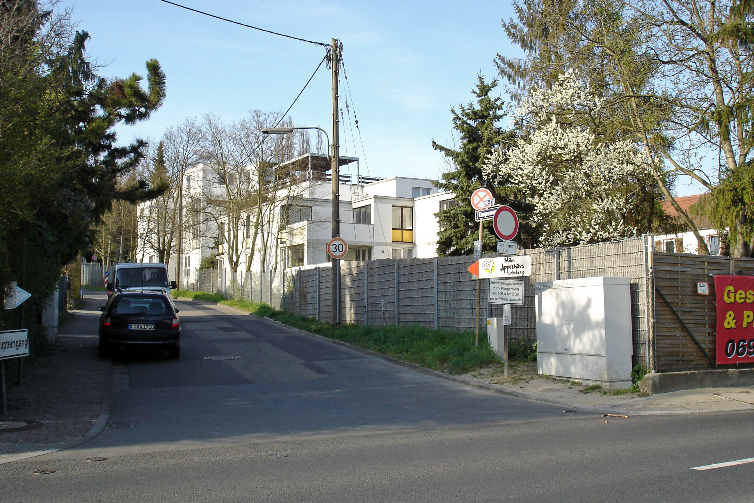 Deutsche Buchhändlerschule in Ffm-Seckbach